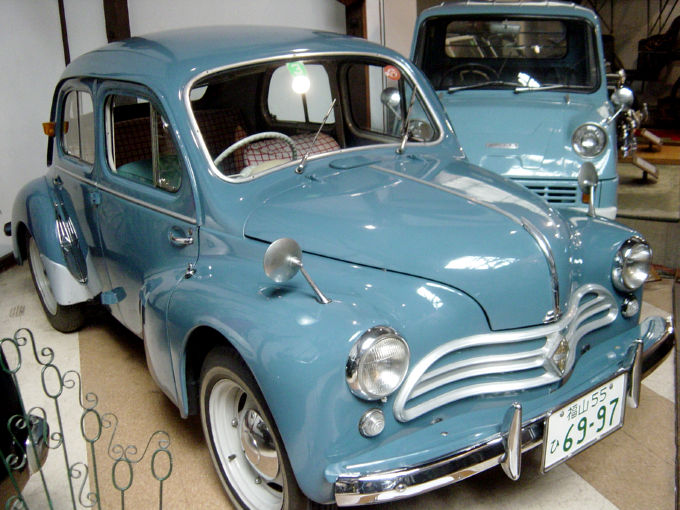 HINO-4CV(日野自動車),Fukuyama MOTOR and CLOCK MUSEUM